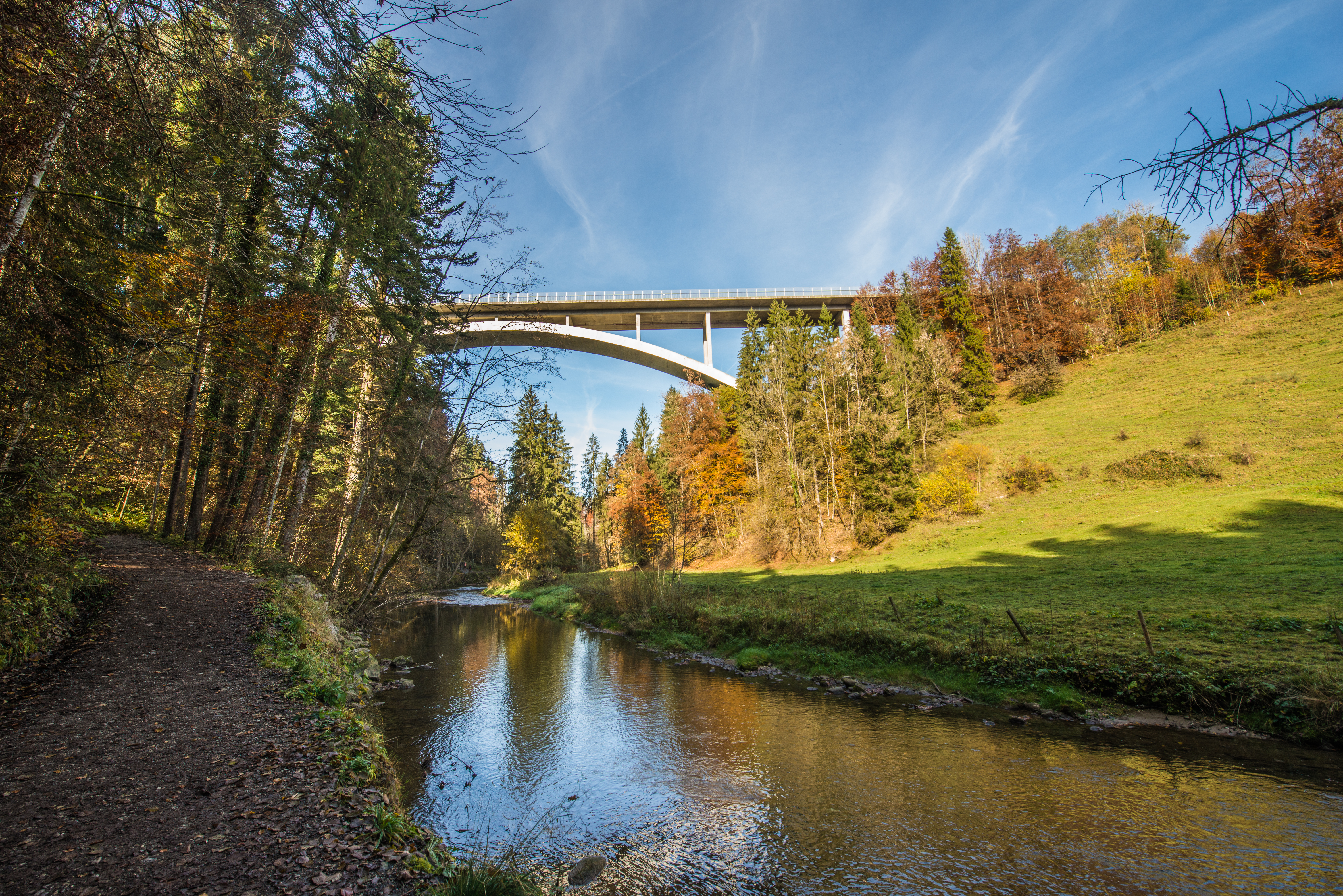 Die Argentobelbrücke ist ein 230 Meter langes Brückenbauwerk der bayerischen Staatsstraße 1318 zwischen den Gemeinden Grünenbach und Maierhöfen im Landkreis Lindau (Bodensee). Sie überspannt in einer Höhe von maximal 56 Metern mit zwölf Feldern die Obere Argen.